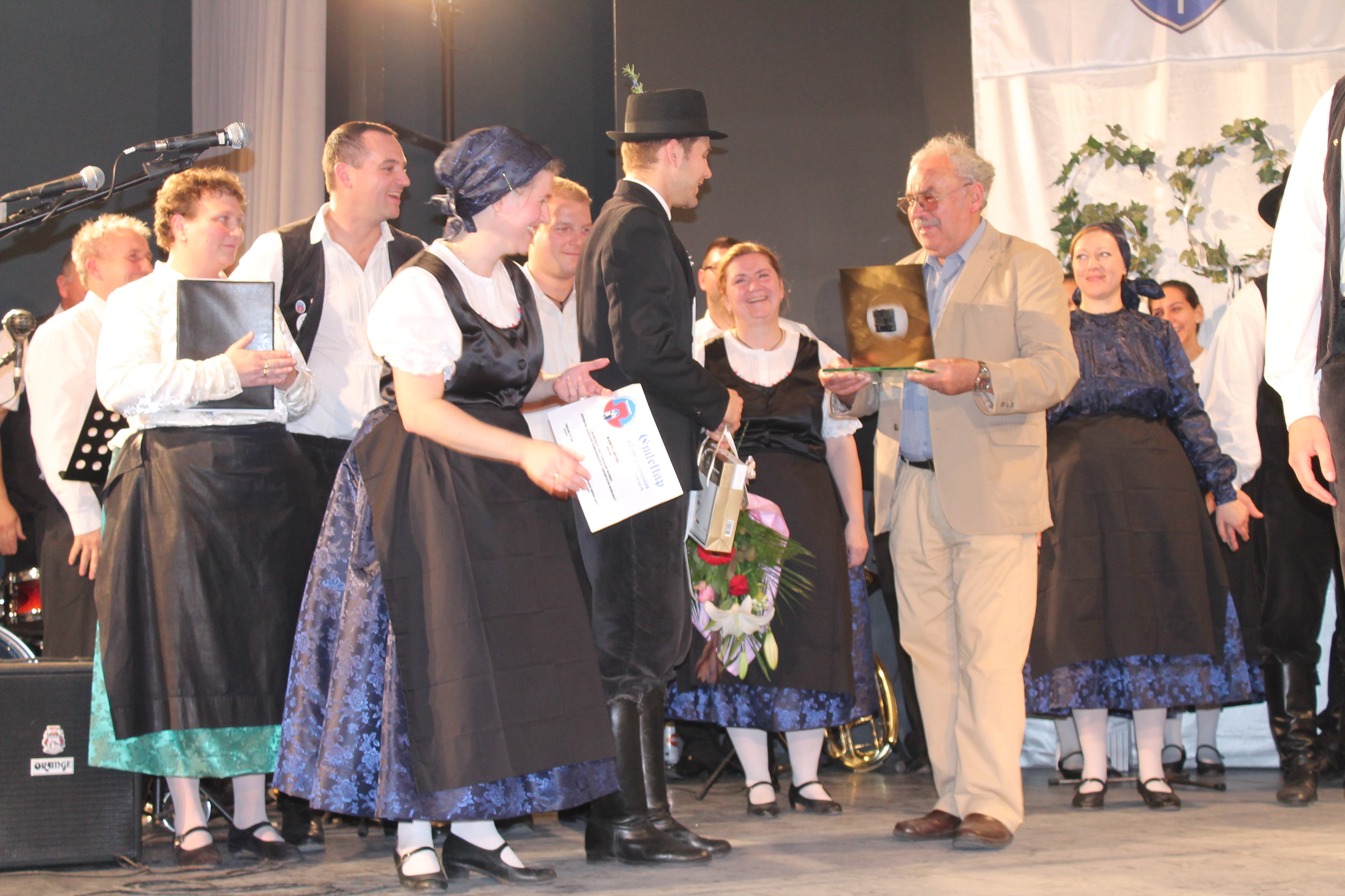 A Pilisvörösvári Német Nemzetiségi Táncegyüttes 60. évfordulóján